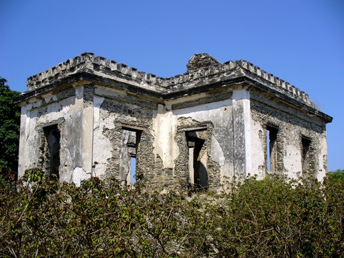 Bekas Penjara Aipelo, East Timor